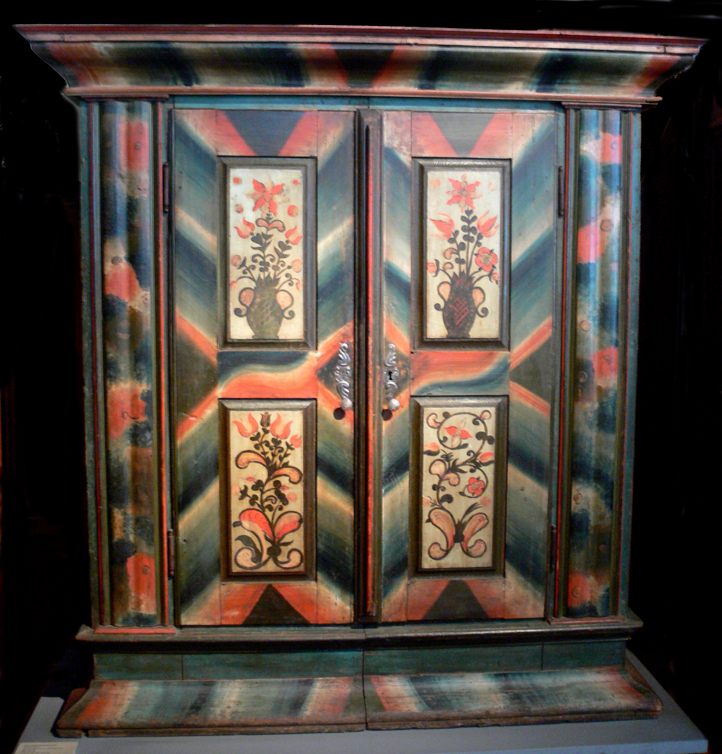 Zweitüriger Kleiderschrank aus der Gegend von Oberjettingen, Ende 18. Jahrhundert, Fichte bemalt Landesmuseum Württemberg (Außenstelle Museum für Volkskultur in Württemberg, Waldenbuch) 1.10., Inv. Nr. VK 1972/165